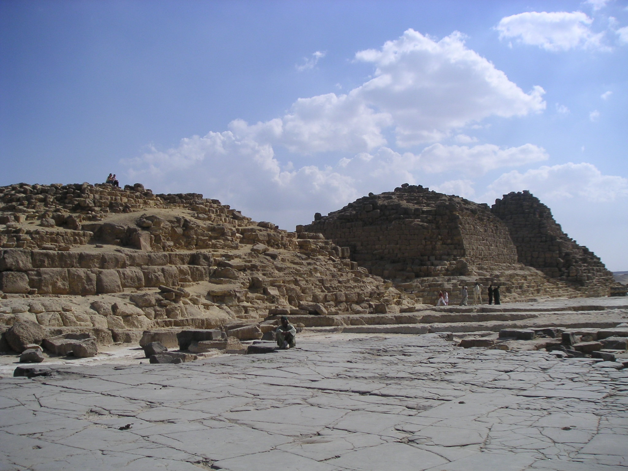 Vue des trois pyramides des reines de Khéops sur à l'est de la Grande Pyramide - Gizeh - novembre 2004